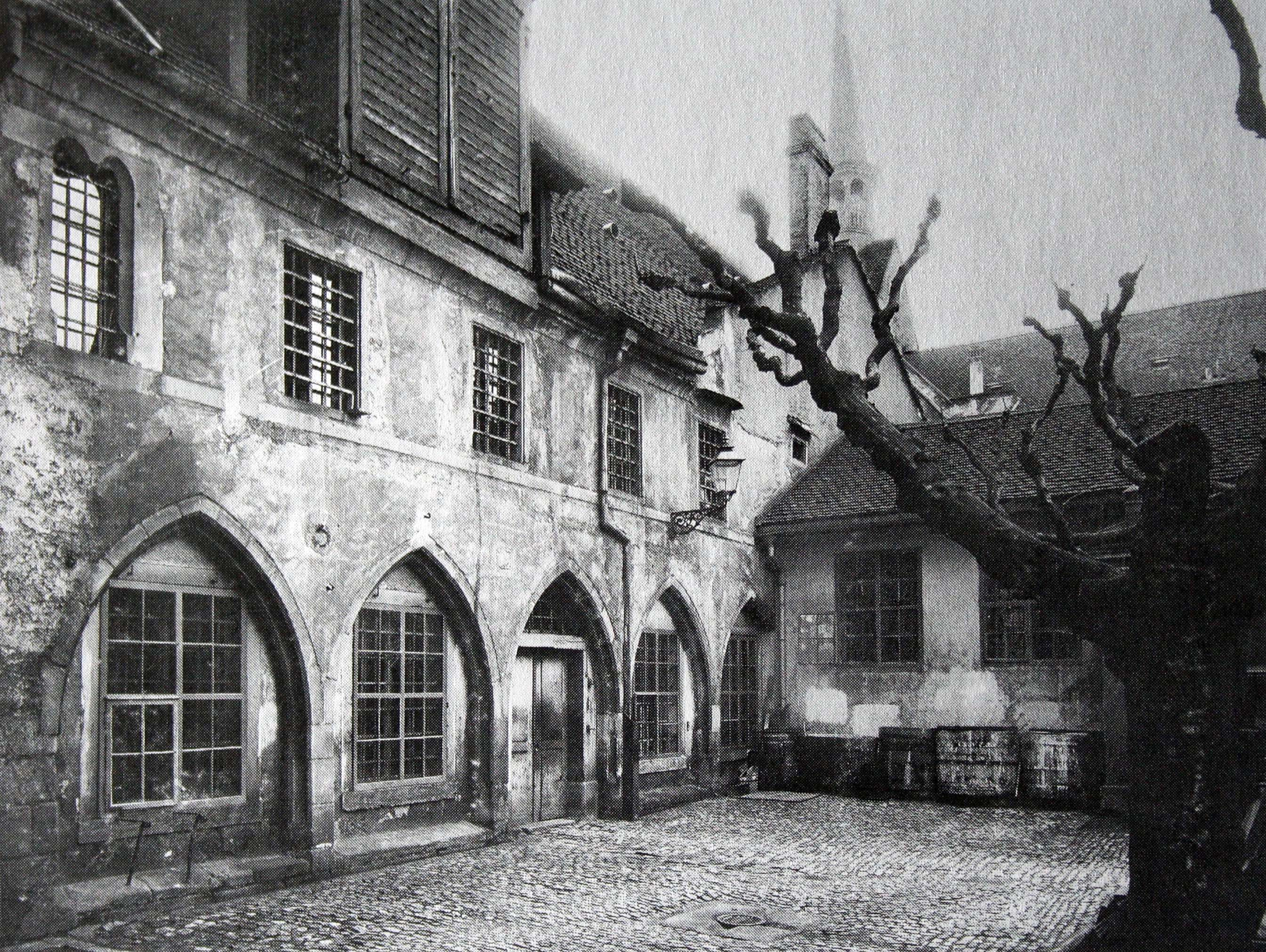 Ostflügel des Kreuzgangs des Klosters Oetenbach, Zürich, vor dem Abbruch, Foto 1900